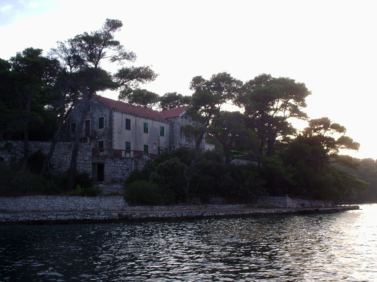 Njivice, obiteljska kuća obitelji Stražičić